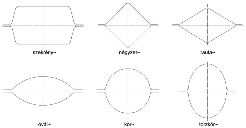 Üregek a nyújtóüregsorokhoz